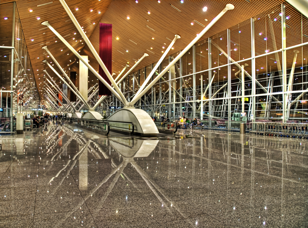 Selfmade, HDR